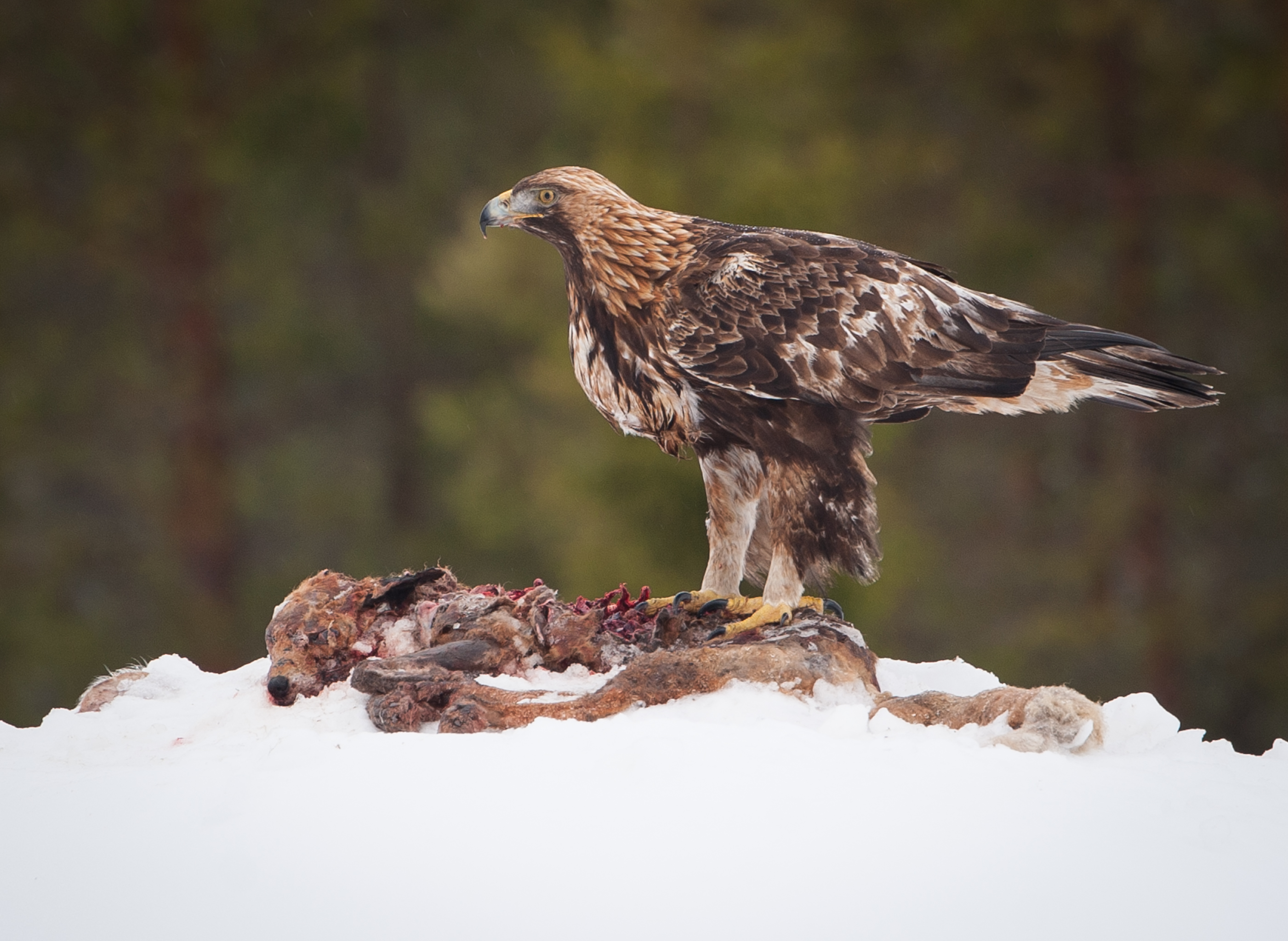 Maakotka Aquila chrysaetos, Utajärvi, Suomi / Finland